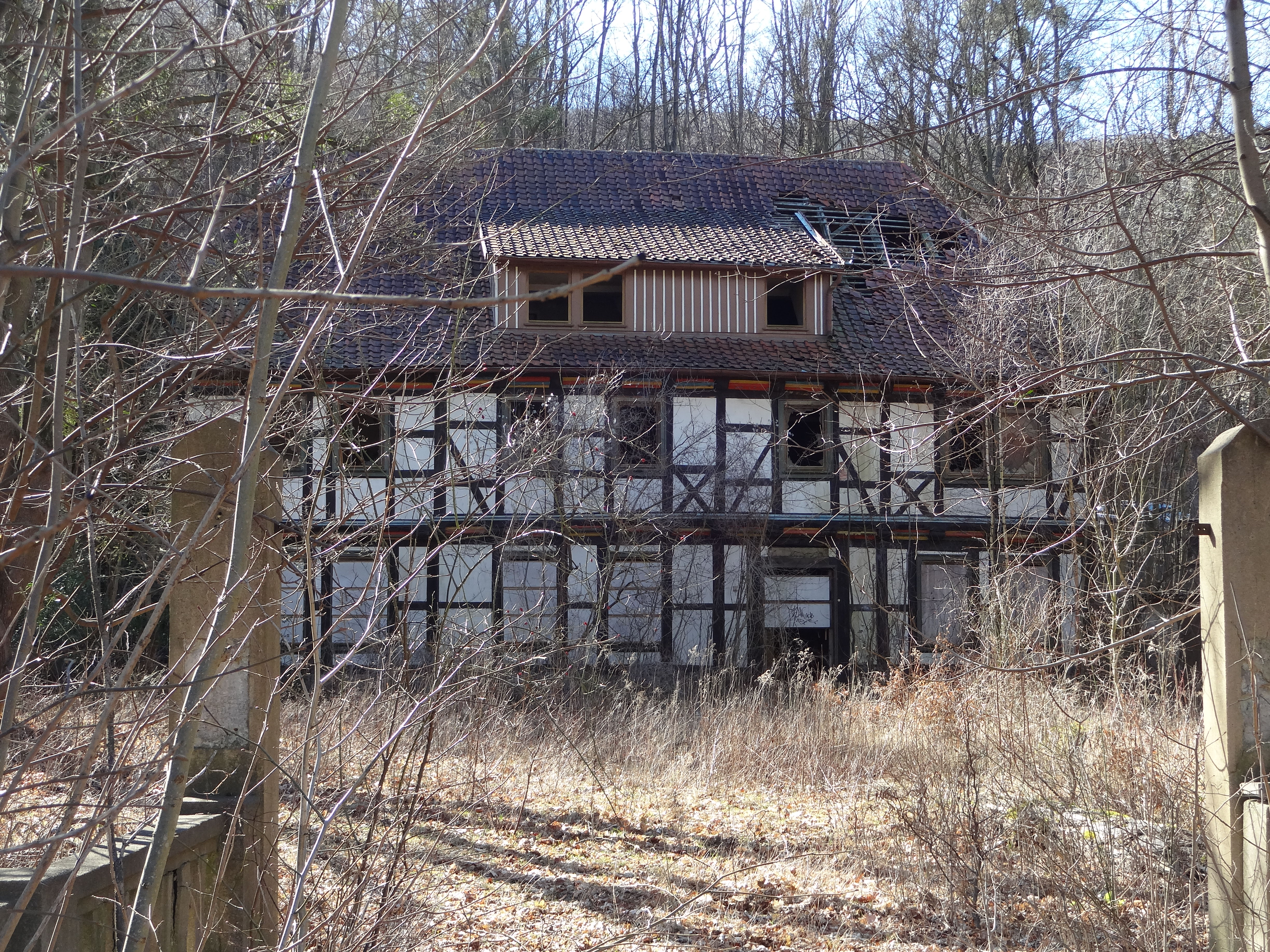 ehemalige denkmalgeschützte Storchenmühle im Mühlental 20 in Wernigerode